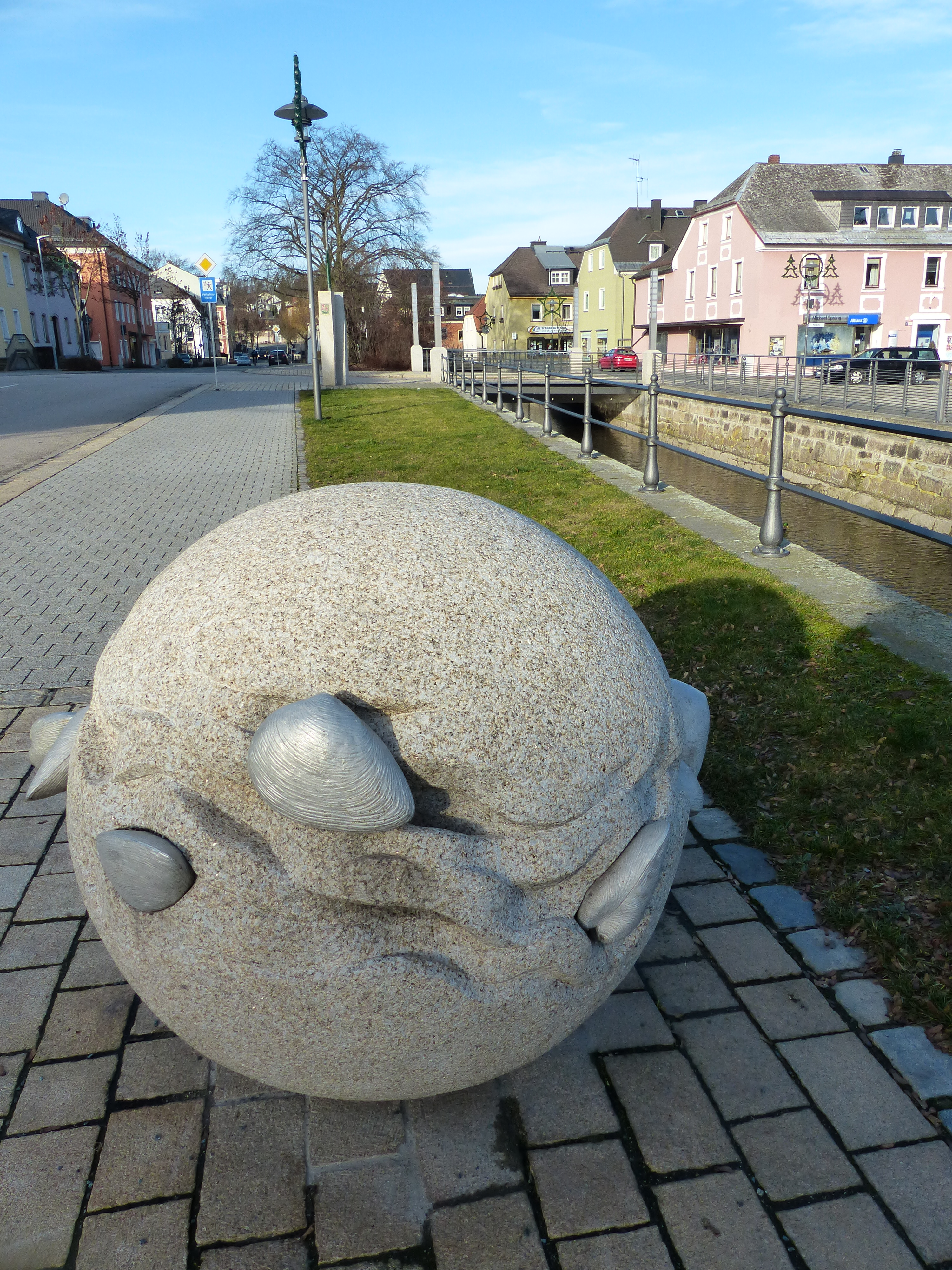 Flussperlmuschel am Perlenbach, Kunstwerk von Günther Mauermann - am Ufer des Perlenbachs in Rehau